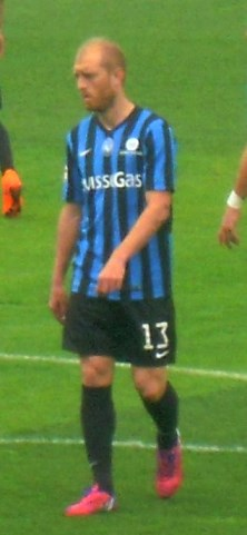 Andrea Masiello, calciatore italiano, con la maglia dell'Atalanta